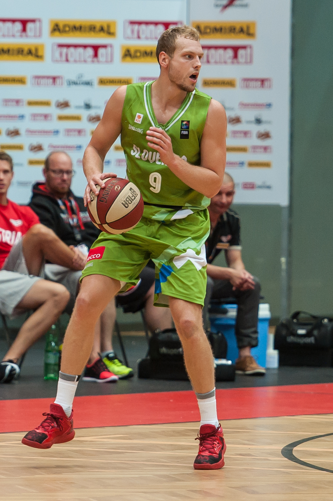 ÖBV Vier-Nationen-Turnier vom 12.-14. August 2016 in Schwechat: Österreich vs Slowenien. Bild zeigt Jaka Blazic (SLO).